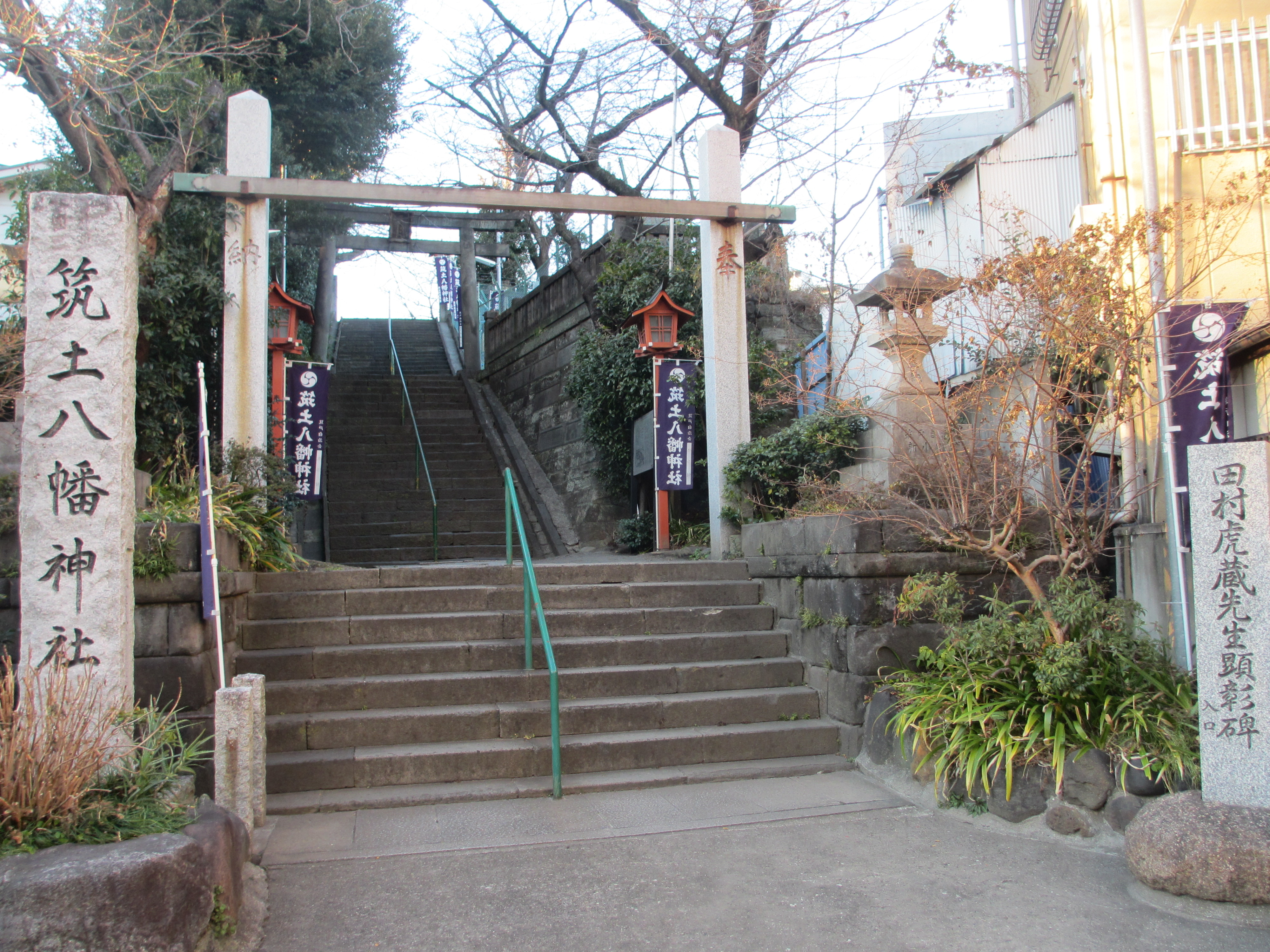 東京都新宿区筑土八幡神社入り口